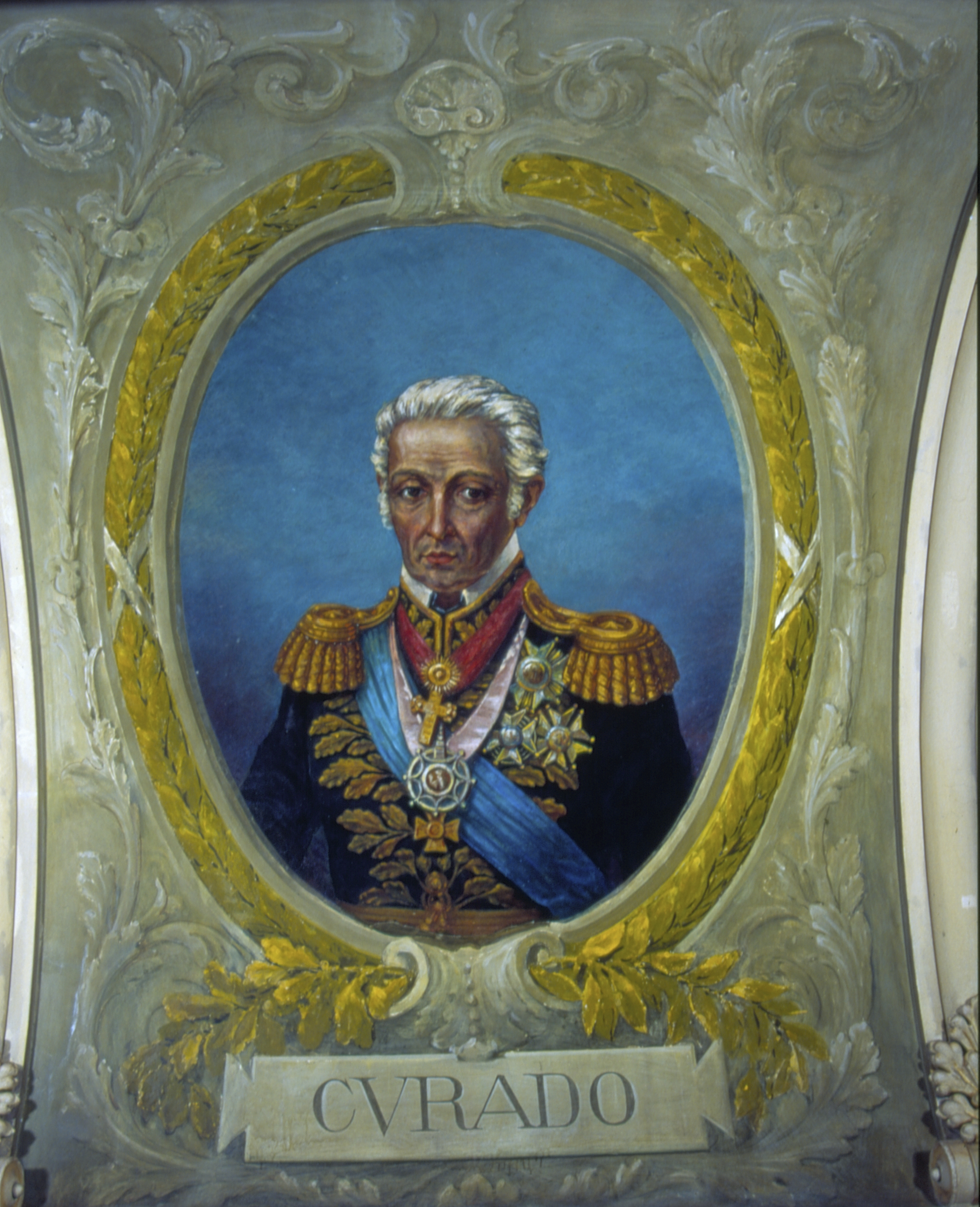 Obra que integra o acervo do Museu Paulista da USP. Coleção Fundo Museu Paulista - FMP